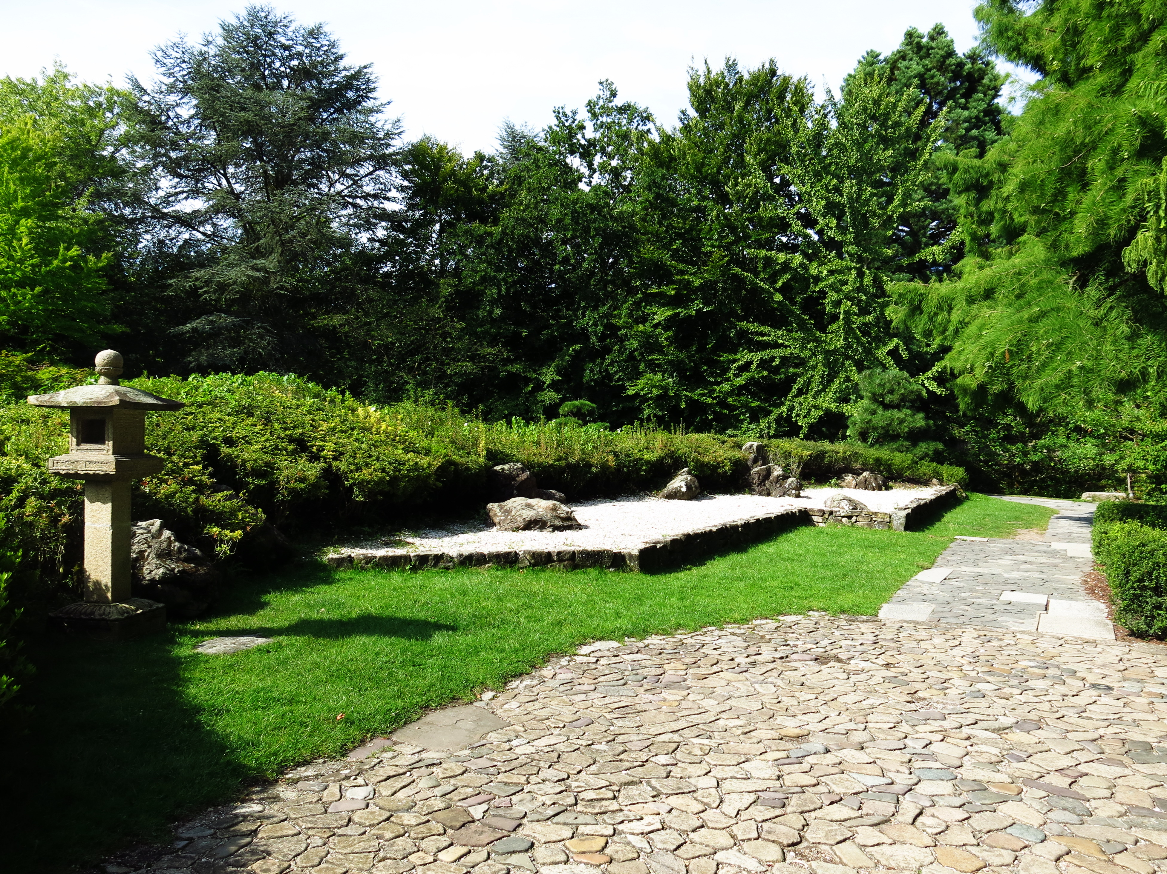 Japanischer Garten in der Bonner Rheinaue.